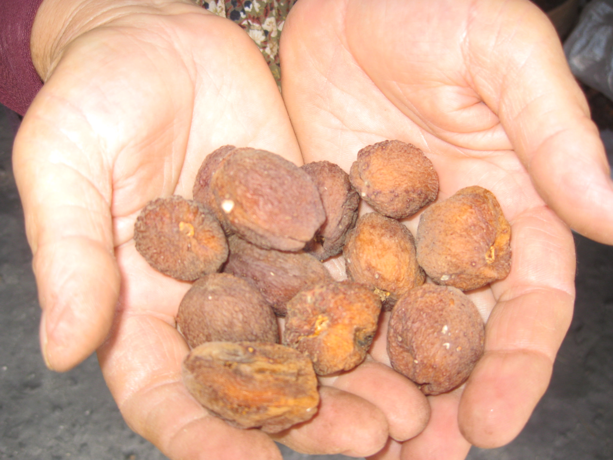 Albaricoques secos